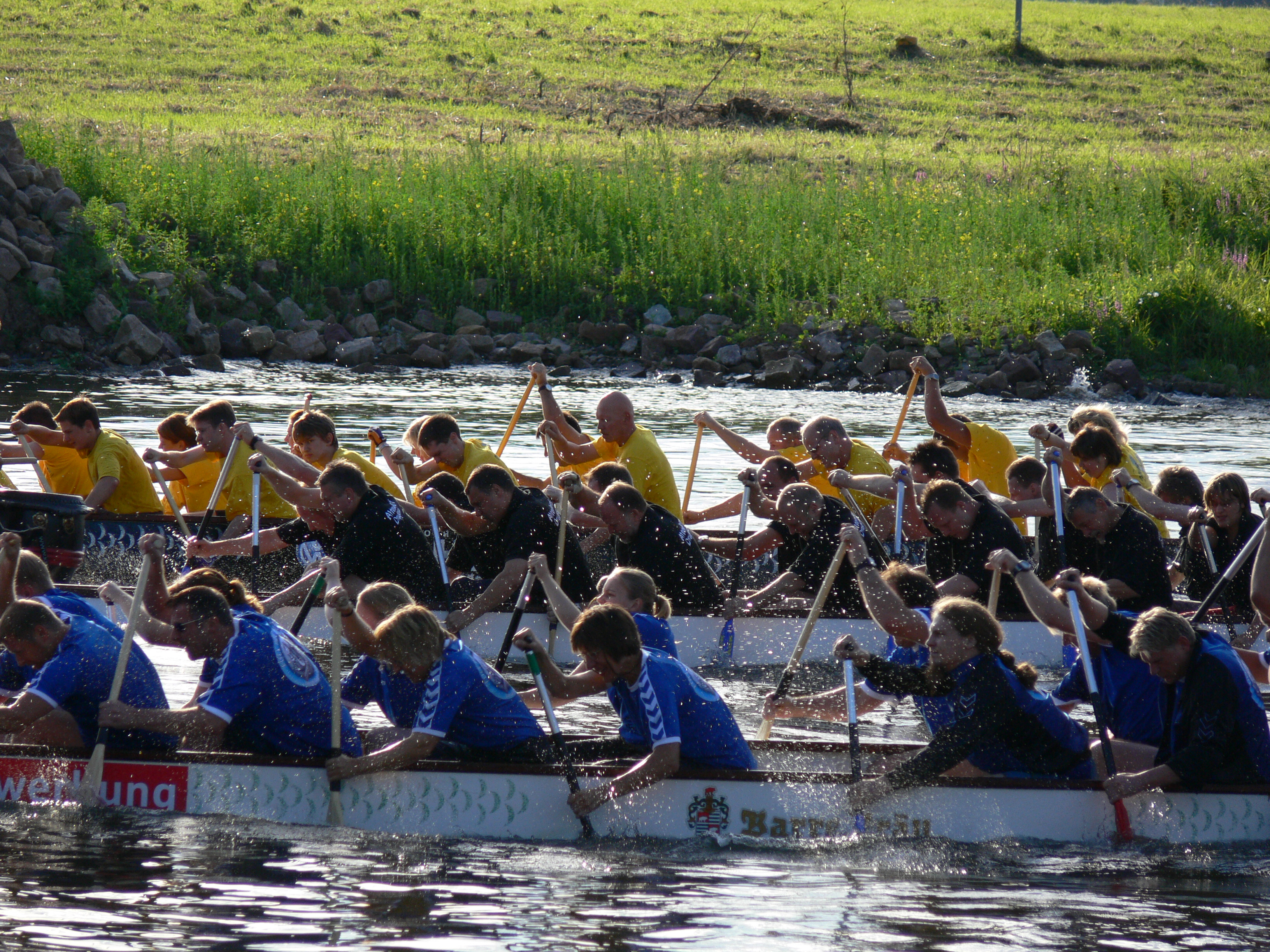 Drachenboote beim Weserdrachen Cup in Minden, Nordrhein-Westfalen, an der Weser.